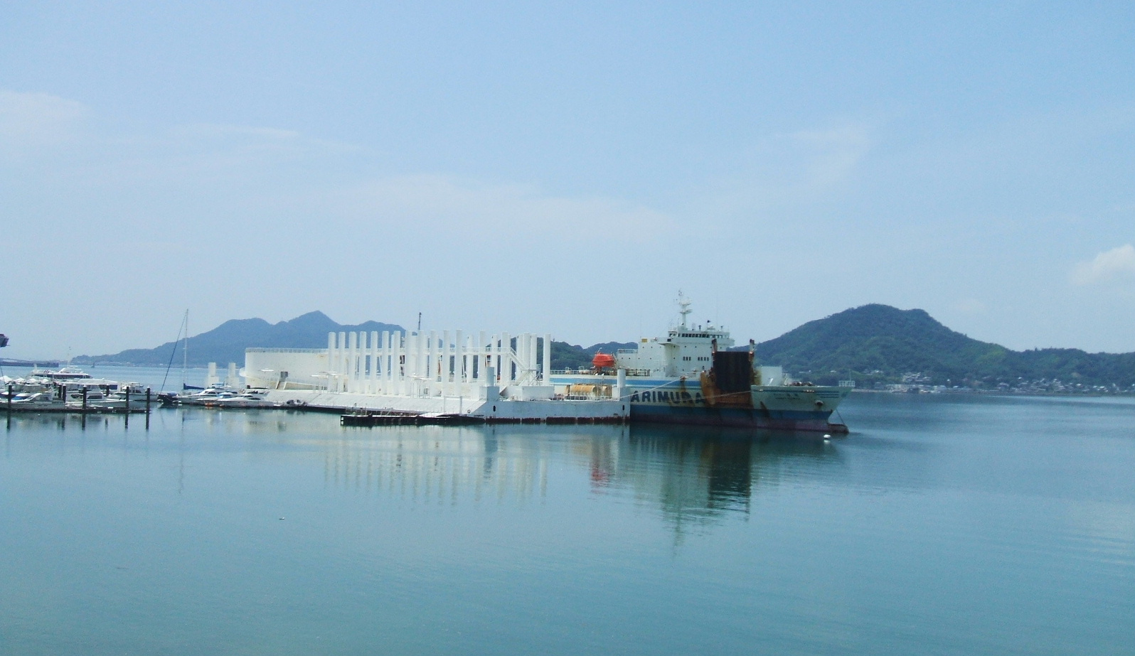 広島県尾道市浦崎にあるマリンパーク境ガ浜の沖合いにある閉鎖された水族館